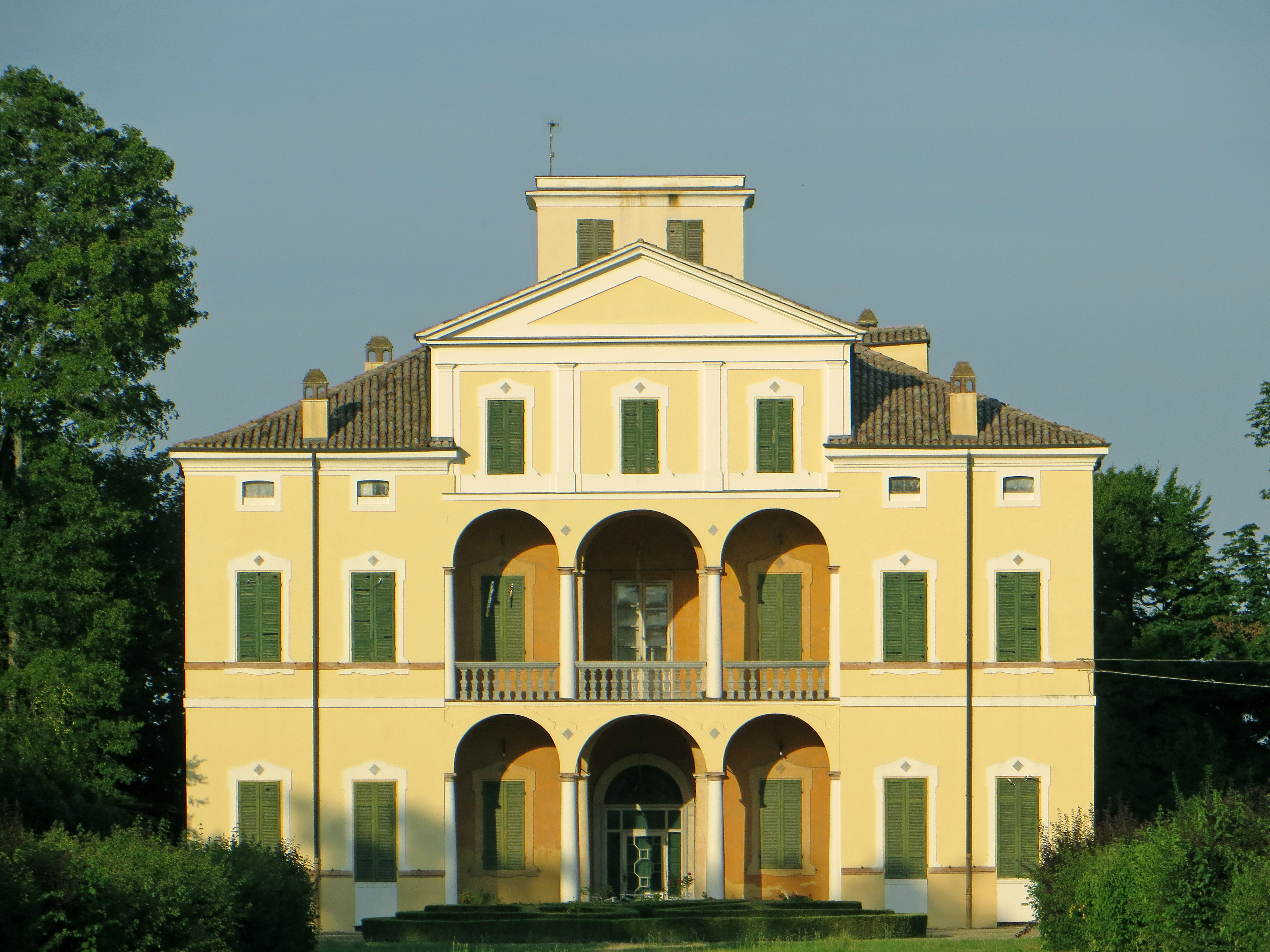 Villa Simonetta (Porporano, Parma) - facciata ovest